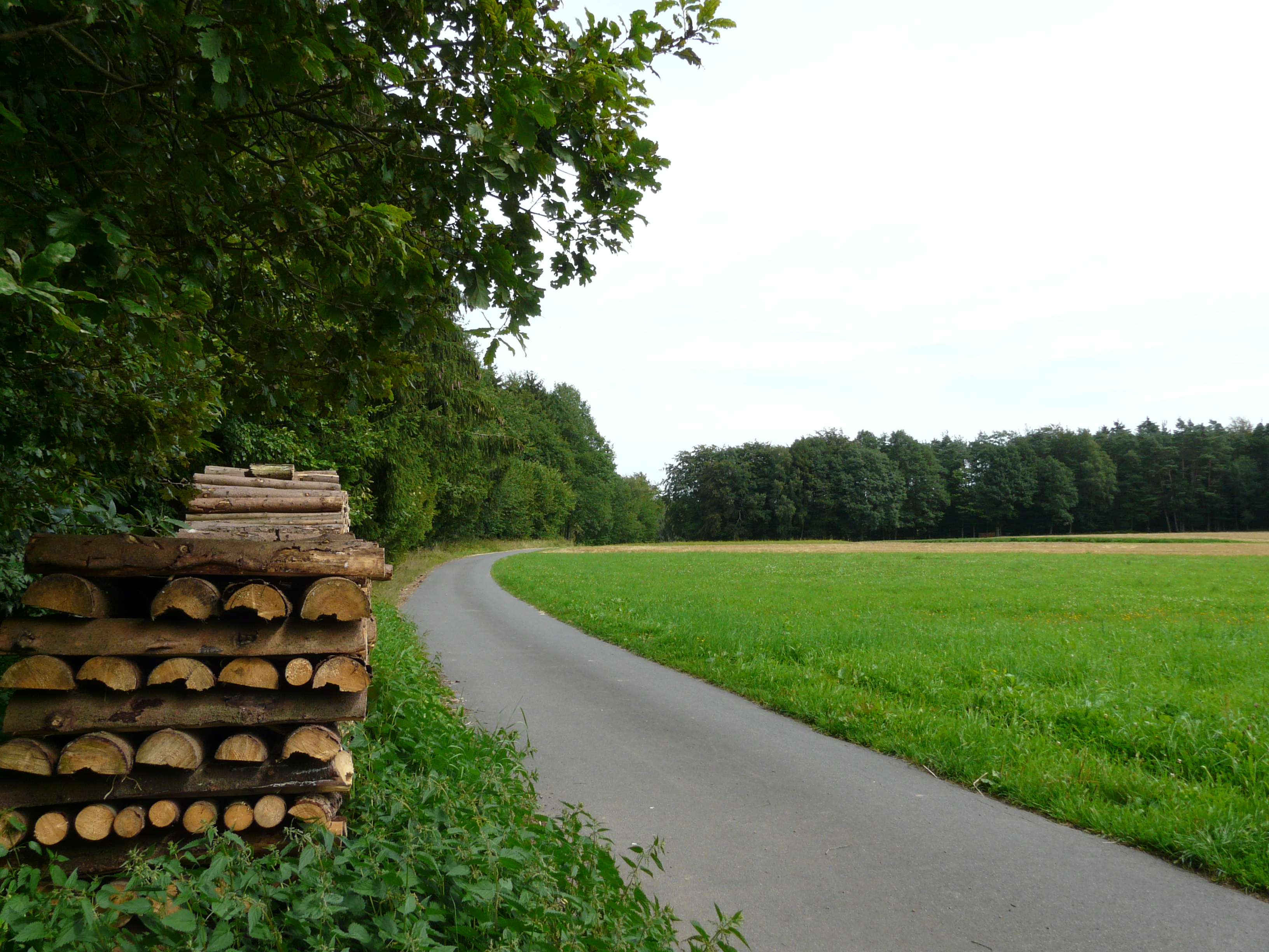 Gegend um die vermutete Turmstelle Wp 10/31 des Odenwaldlimes